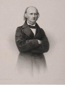 Porträt des Chirurgen Gustav Biedermann Günther